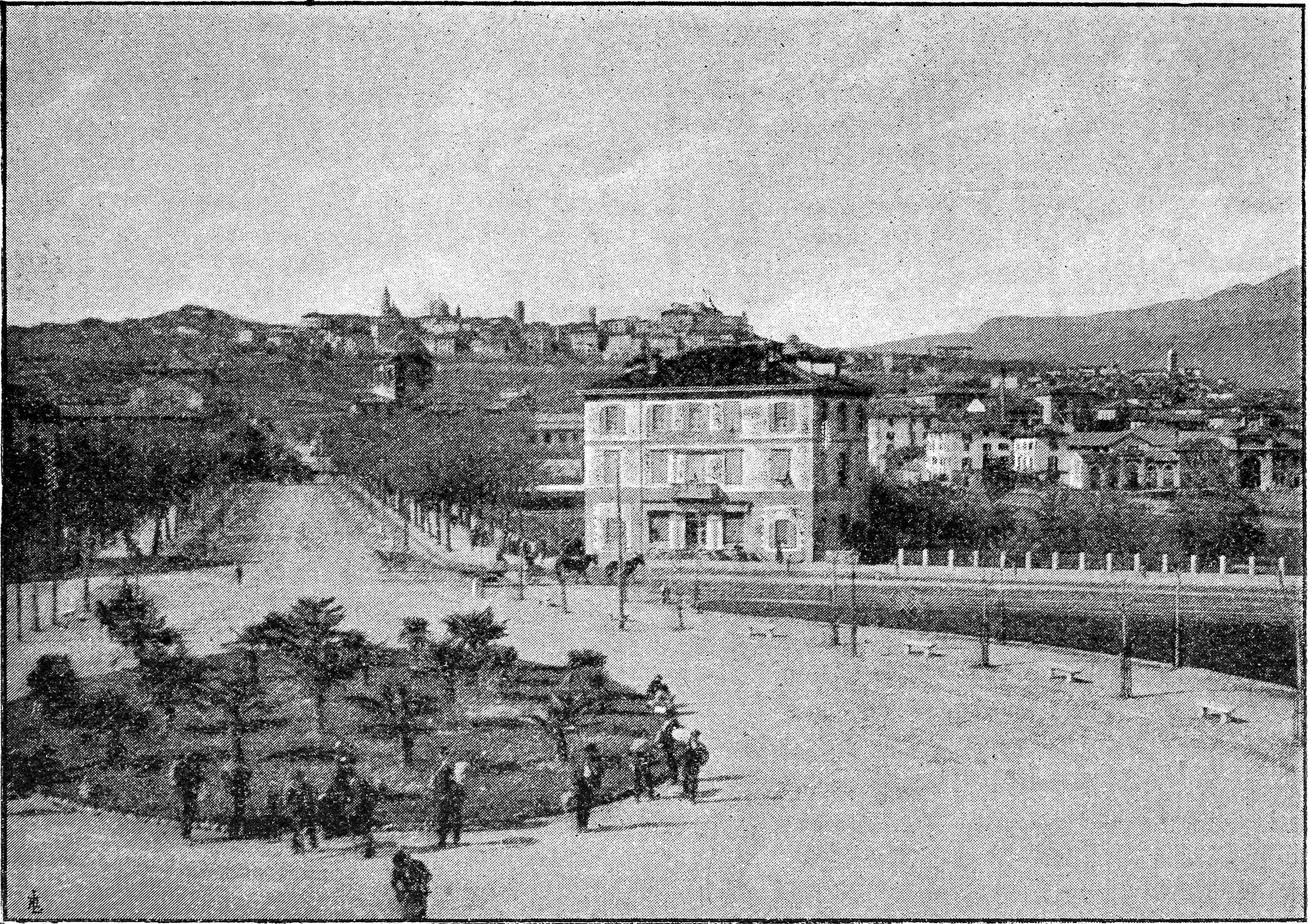 Immagine dal libro La Valle Seriana, Antonio Vallardi, Milano, 1900 - Bergamo, vista dalla stazione